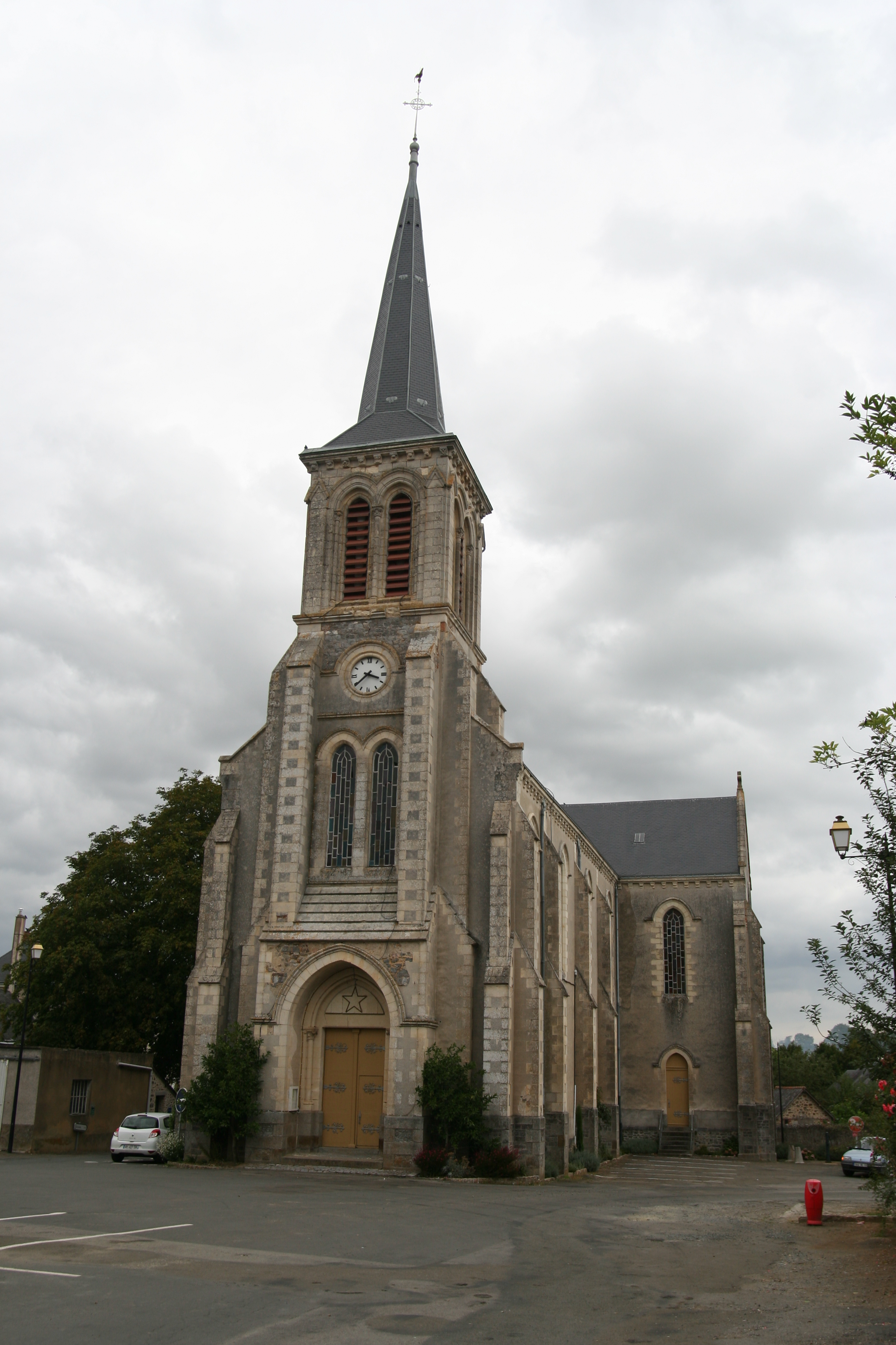 Église Saint-Médard de Soulgé-sur-Ouette.